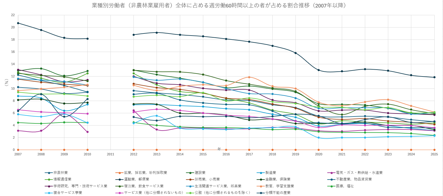 業種別週労働40時間以上労働者（非農林業雇用者）全体に占める週労働60時間以上の者が占める割合推移（2007年以降）